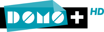 Logo kanału domo+ HD (2011)